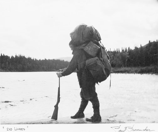 Français cadien: Photo d’un coureur des bois partant en expédition sur la Côte-Nord. (MRC de Manicouagan)